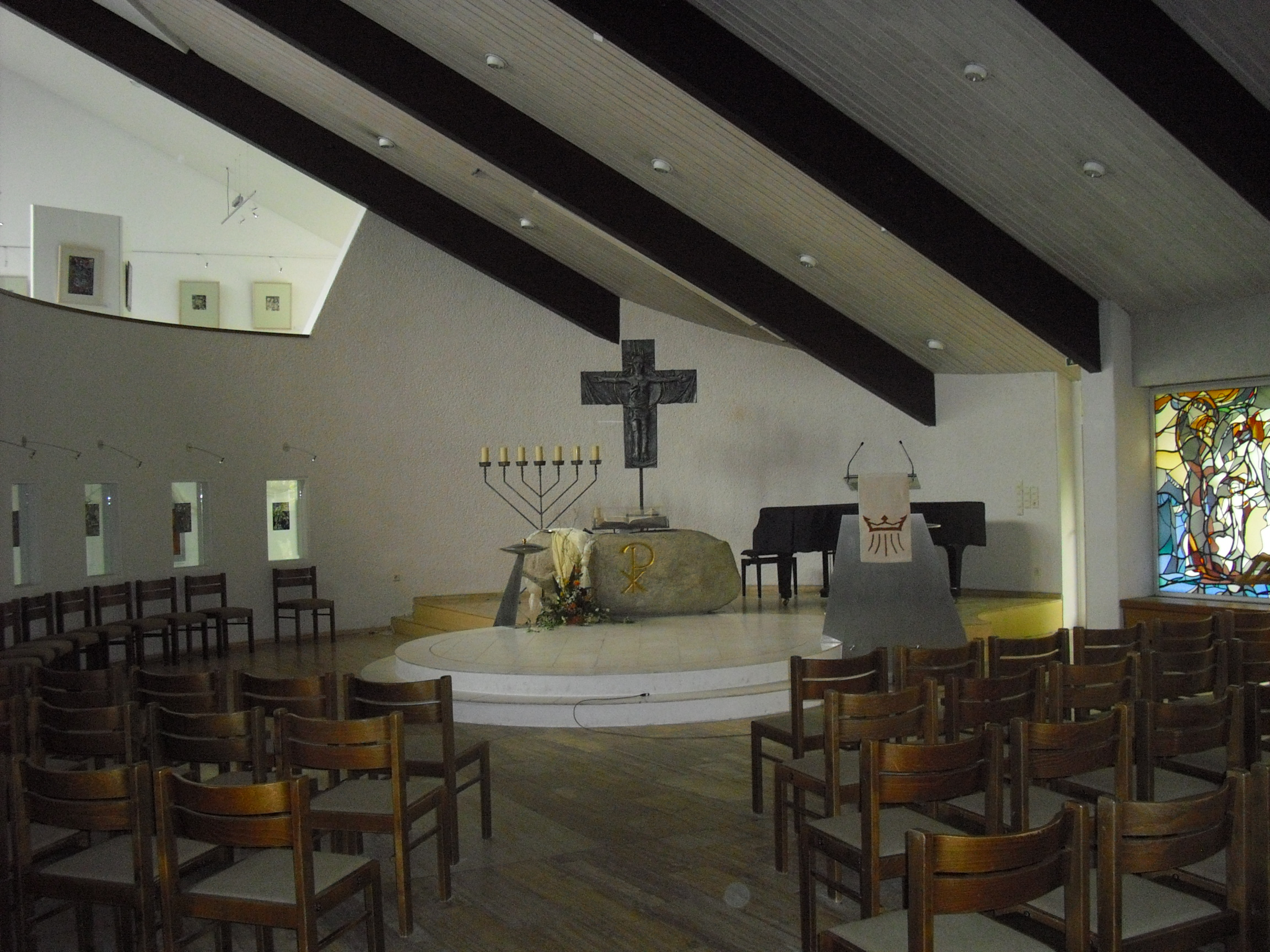 Inneres der Kirche des Geistlichen Rüstzentrums Krelingen